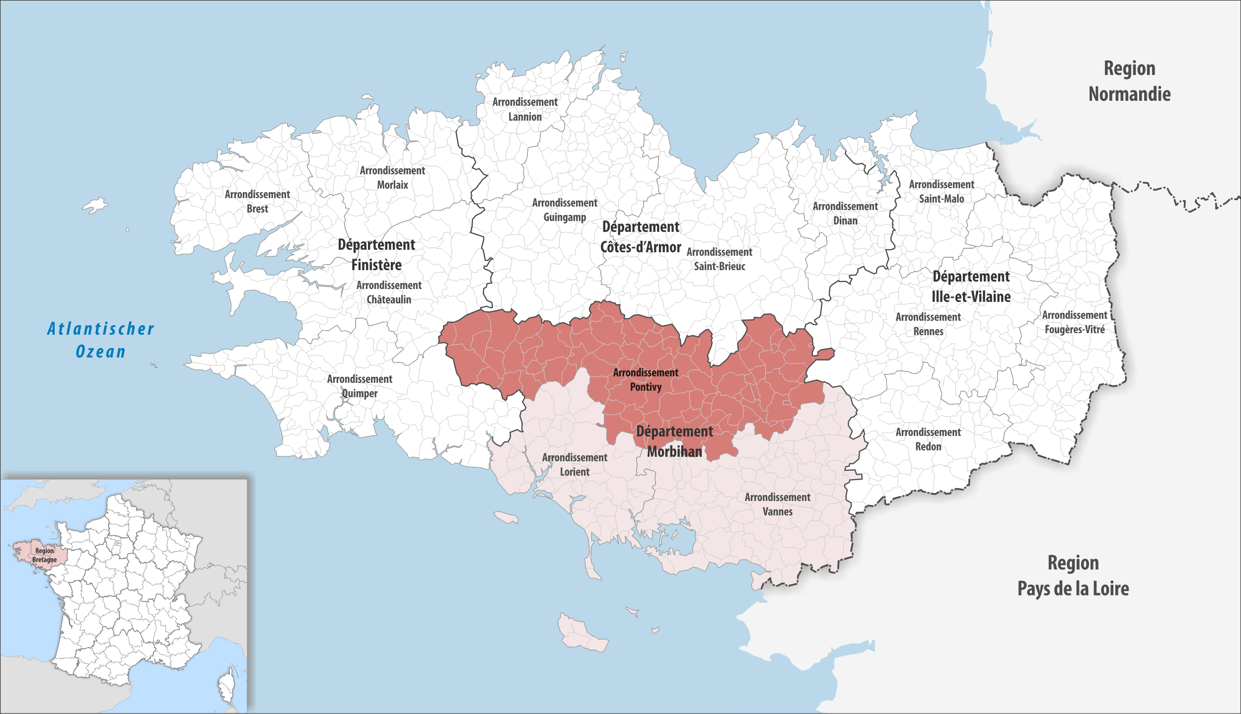 Lage des Arrondissements Pontivy